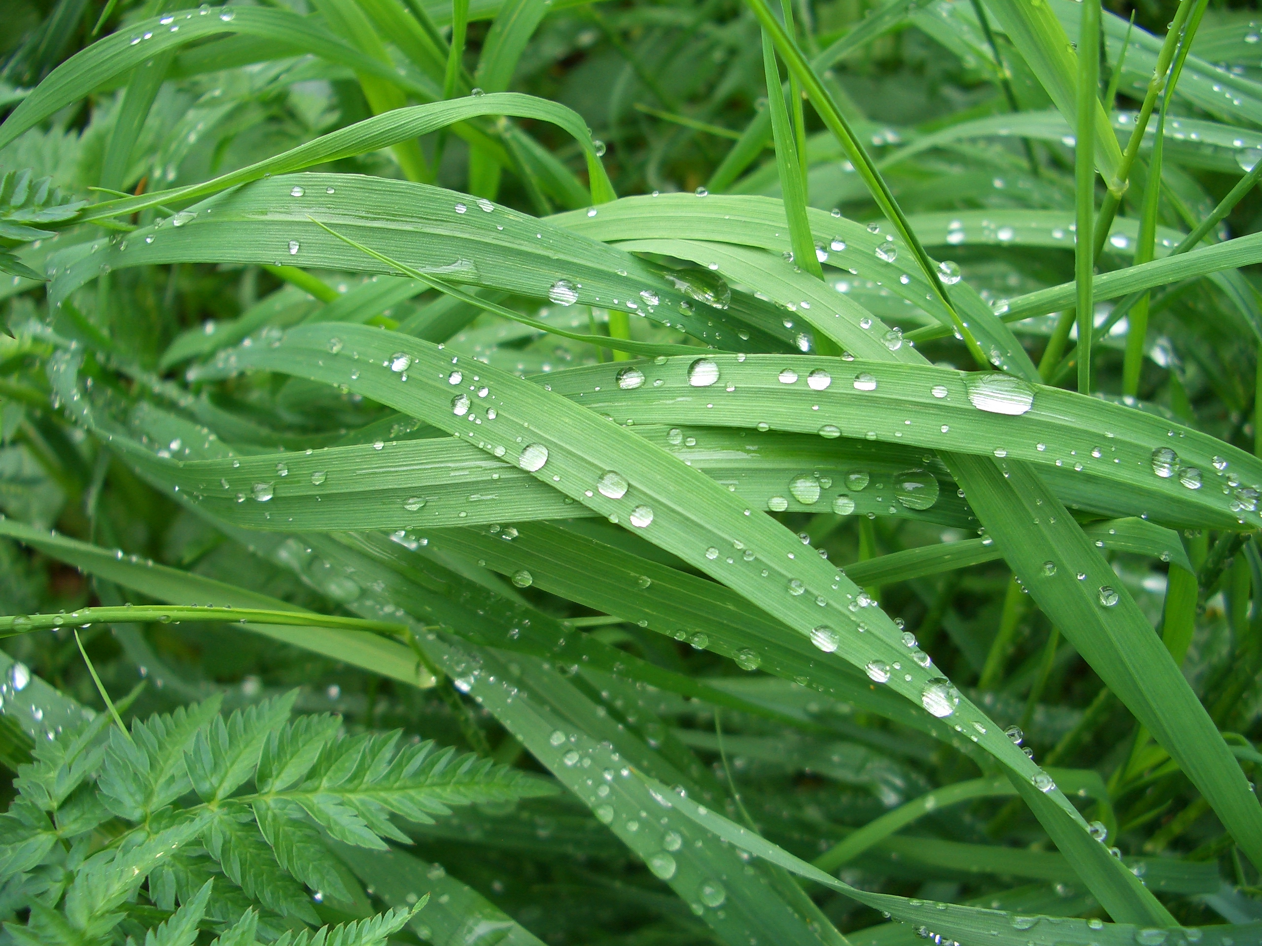 Tautropfen auf Grashalmen in Nahaufnahme